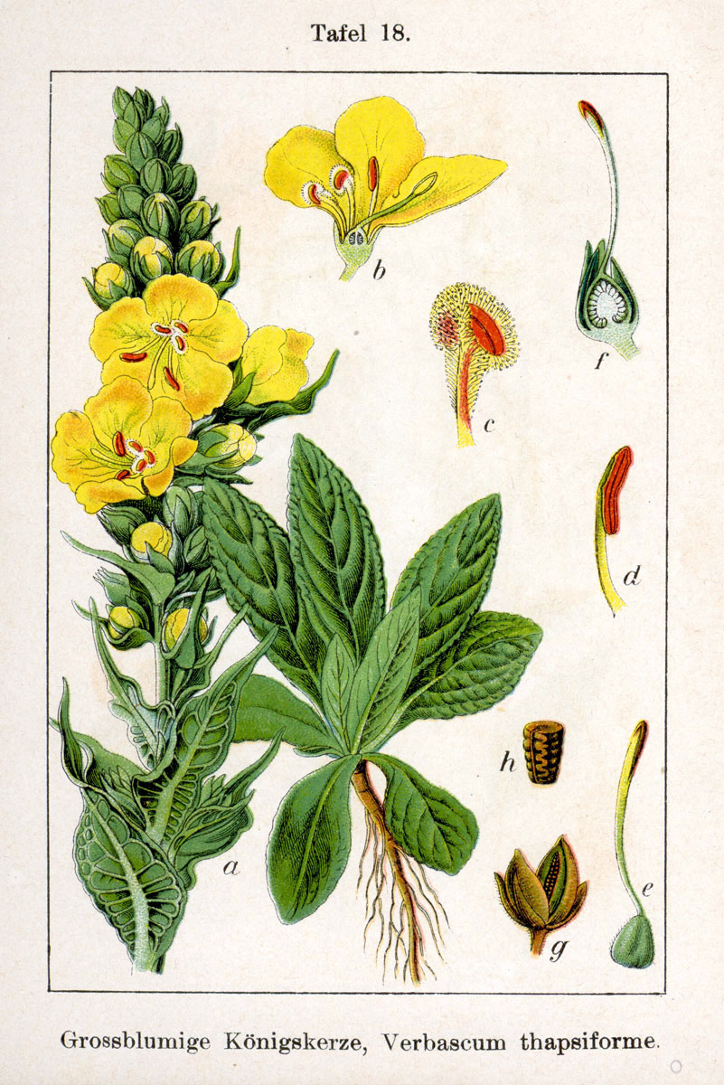 Verbascum densiflorum Bertol., syn. Verbascum thapsiforme Schrad. Original Description Grossblumige Königskerze, Verbascum thapsiforme